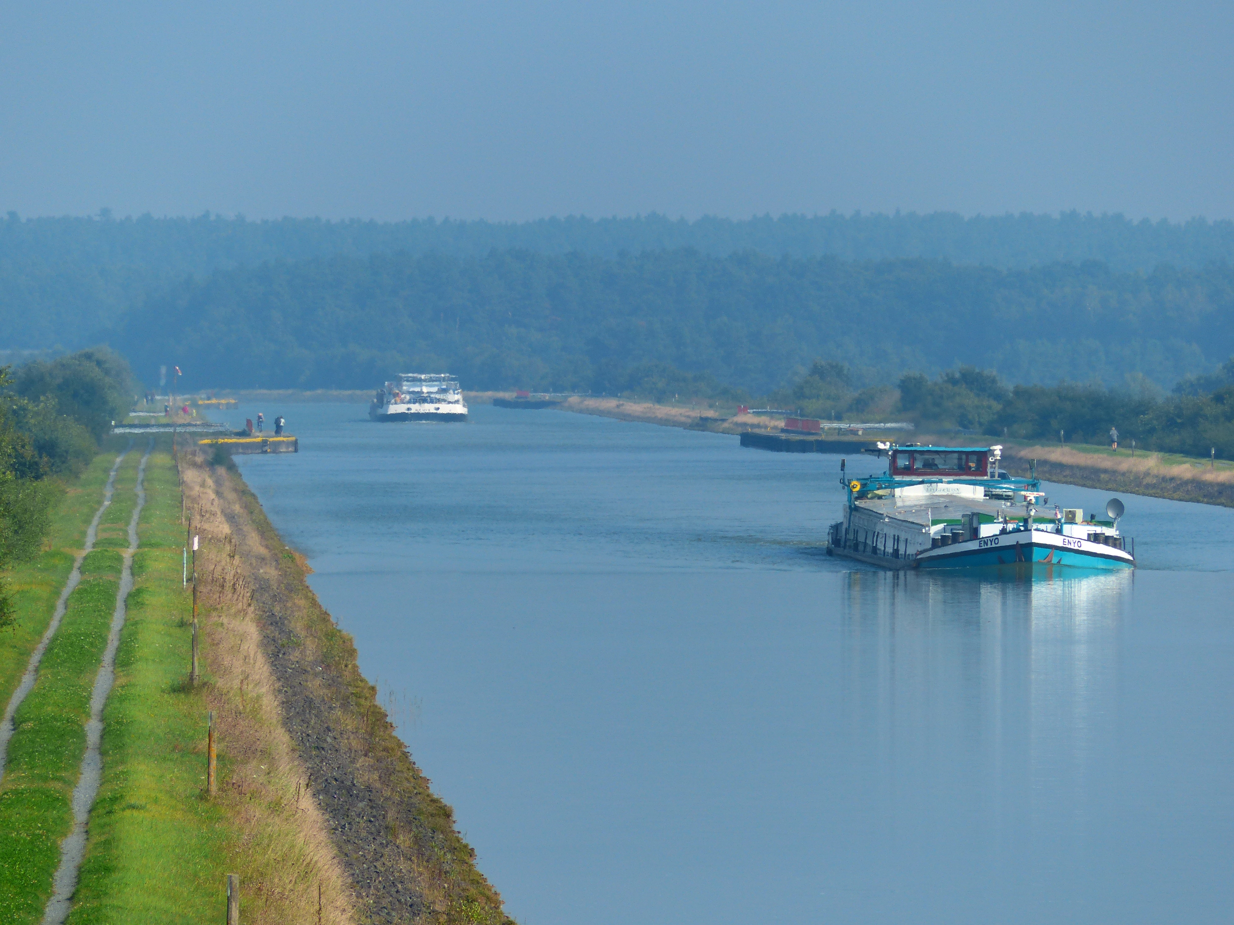 Elbe-Seitenkanal bei Walmsdorf, nordwärts